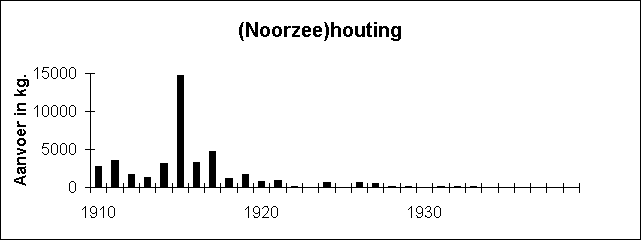 Vangst van de houting. Toestemming hr de Nie